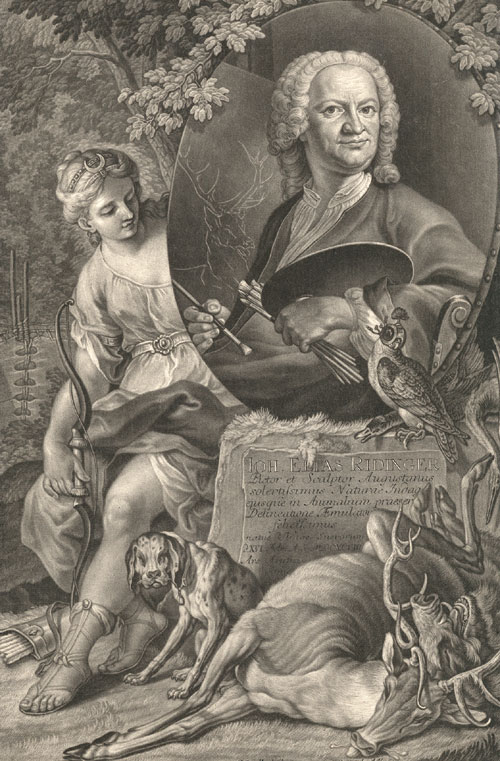 Bildnis des Johann Elias Ridinger